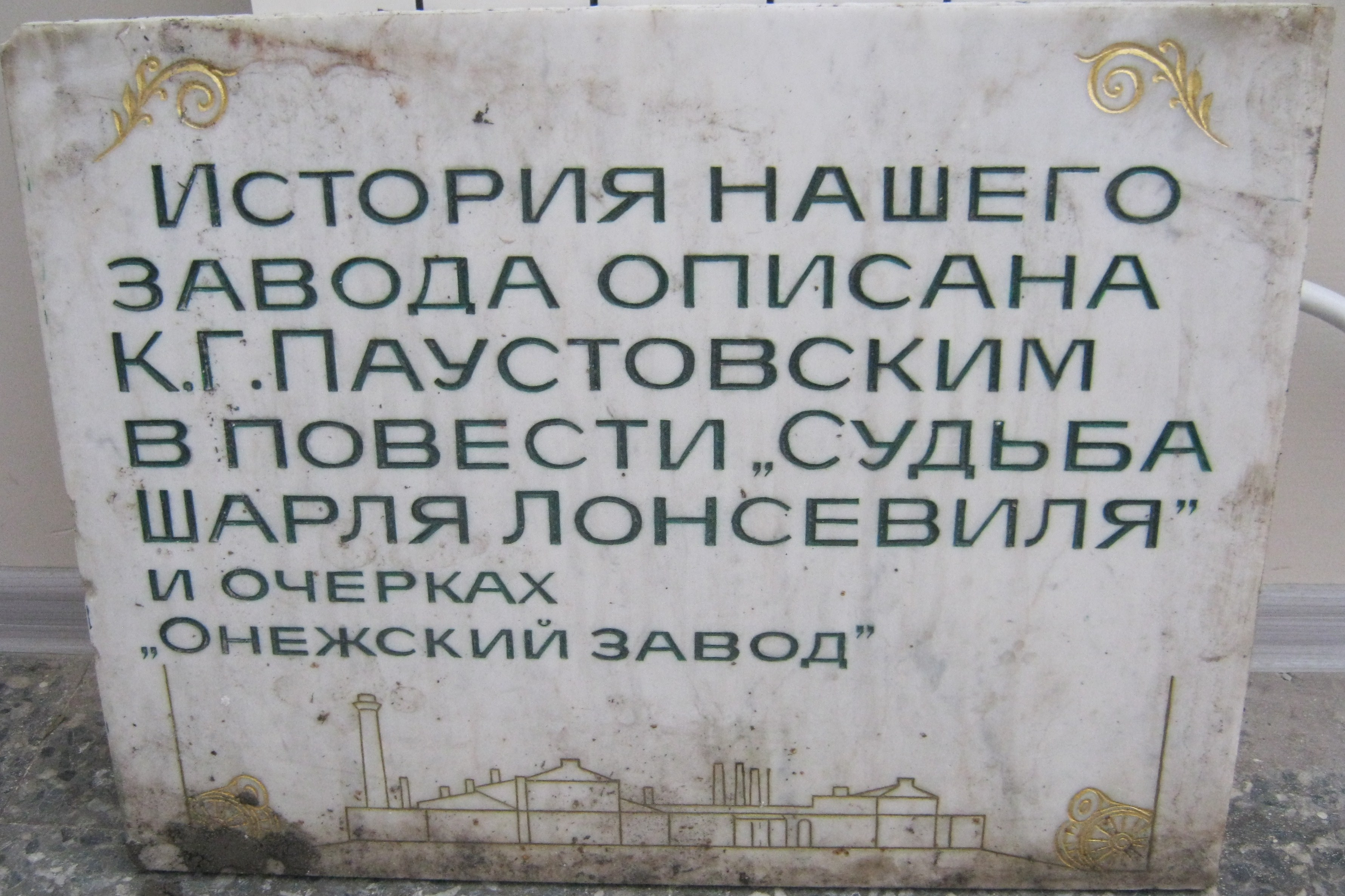 мемориальная доска - Онегзавод